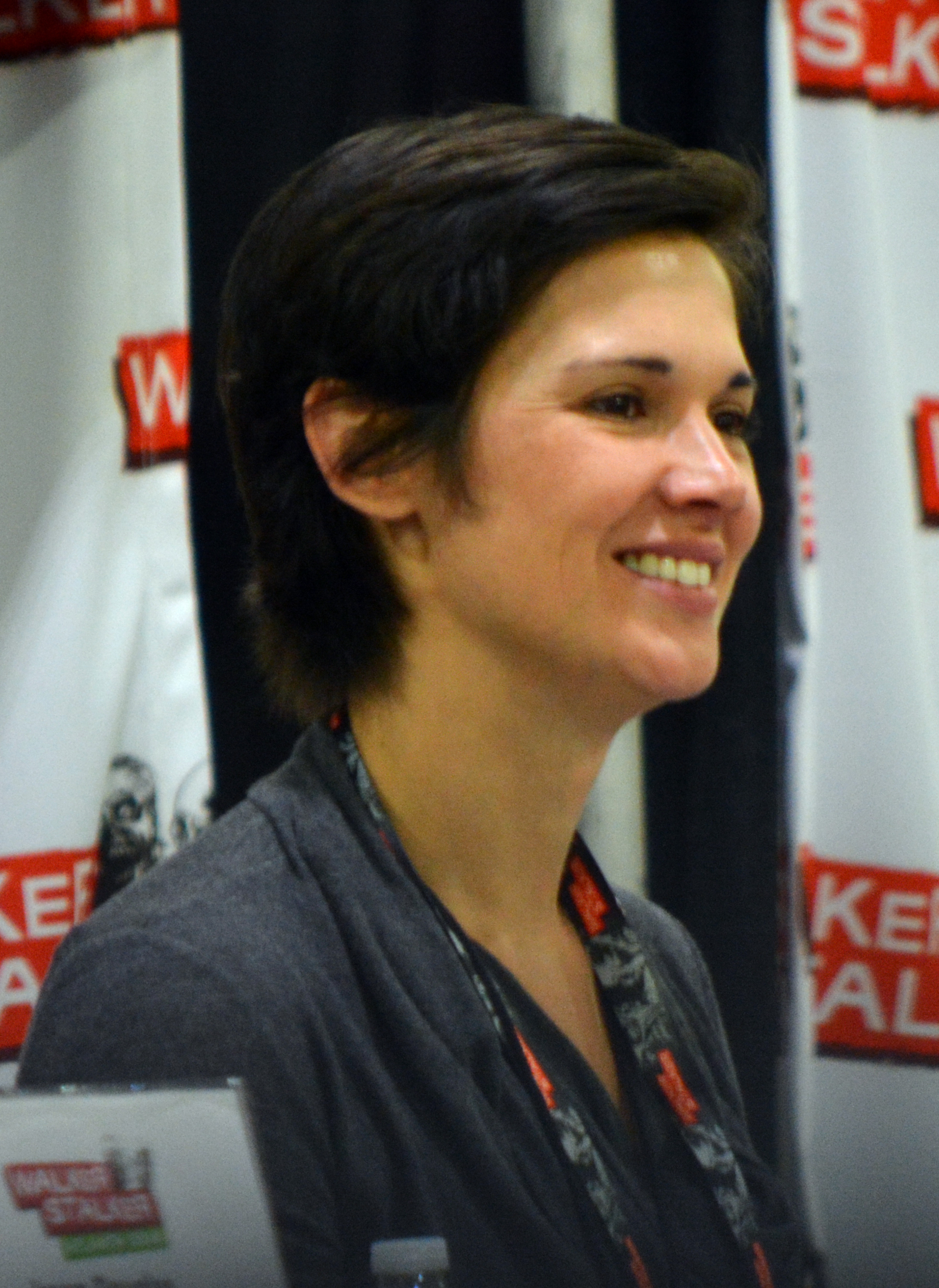 Walker Stalker Con 2016 Atlanta